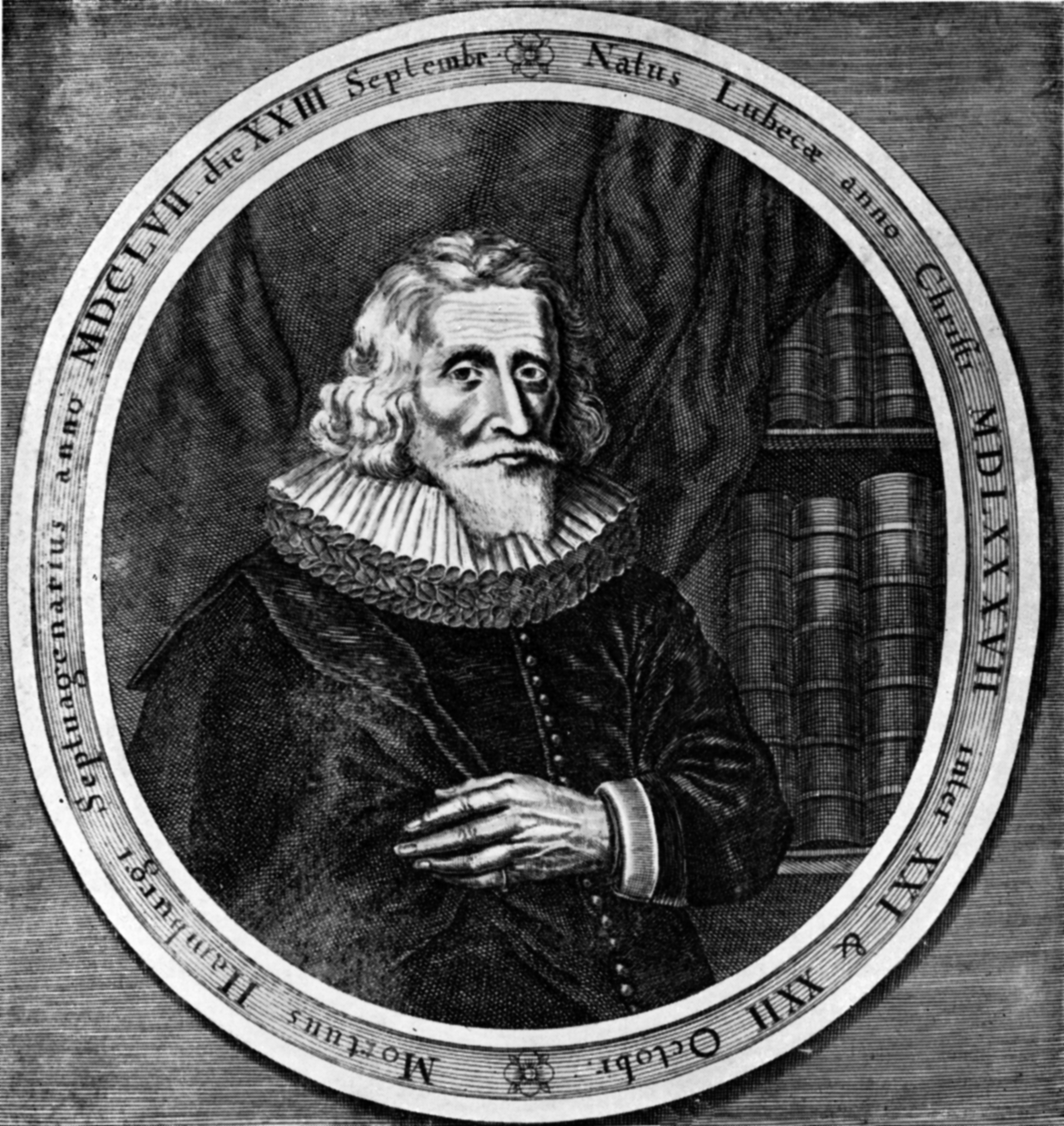 Joachim Jung (ou Jungius) est un philosophe, un mathématicien et naturaliste allemand, né le 22 octobre 1587 à Lubeck et mort le 17 septembre 1657 à Hambourg.